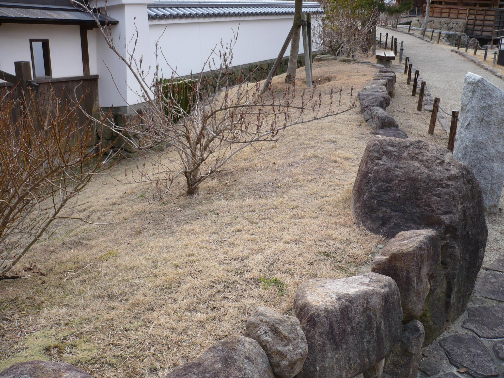 池田城の土塁跡